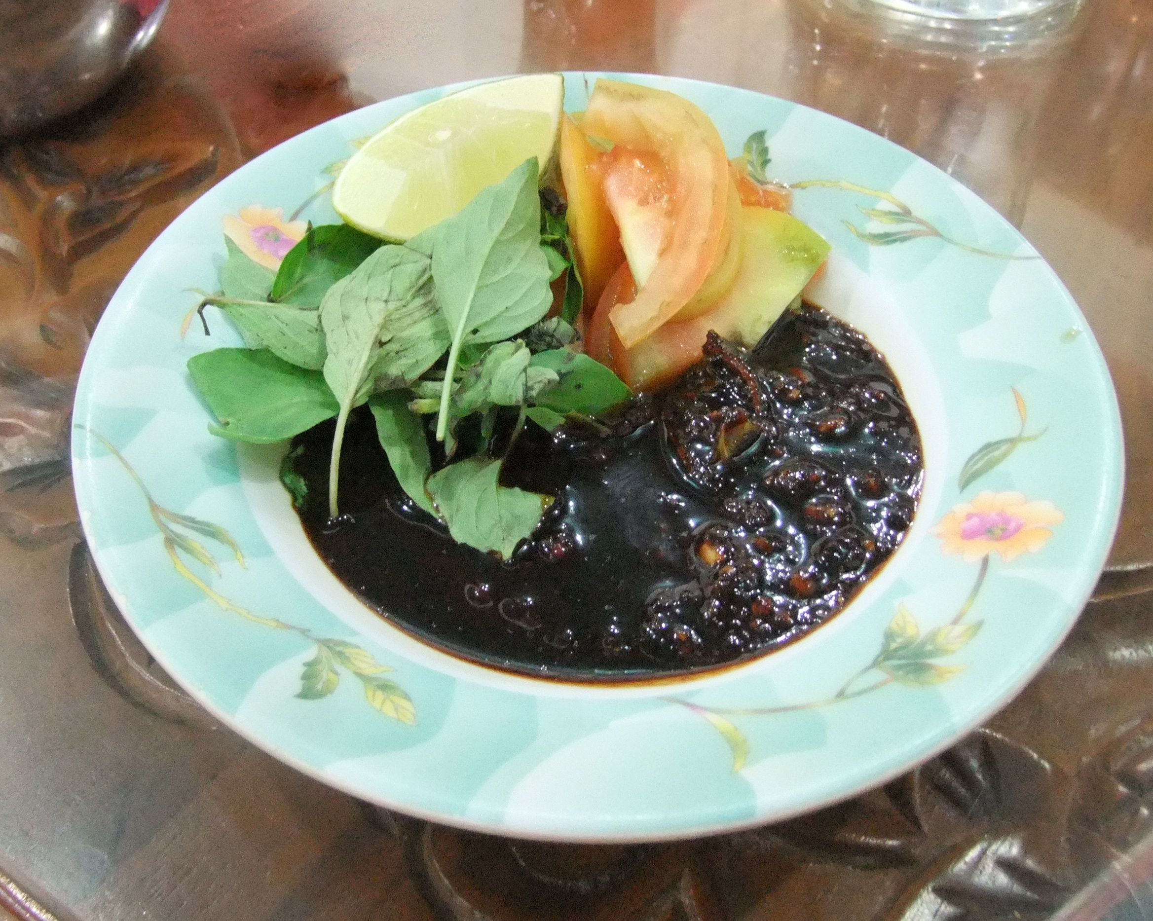 Sambal petis untuk ikan bolu di Parepare